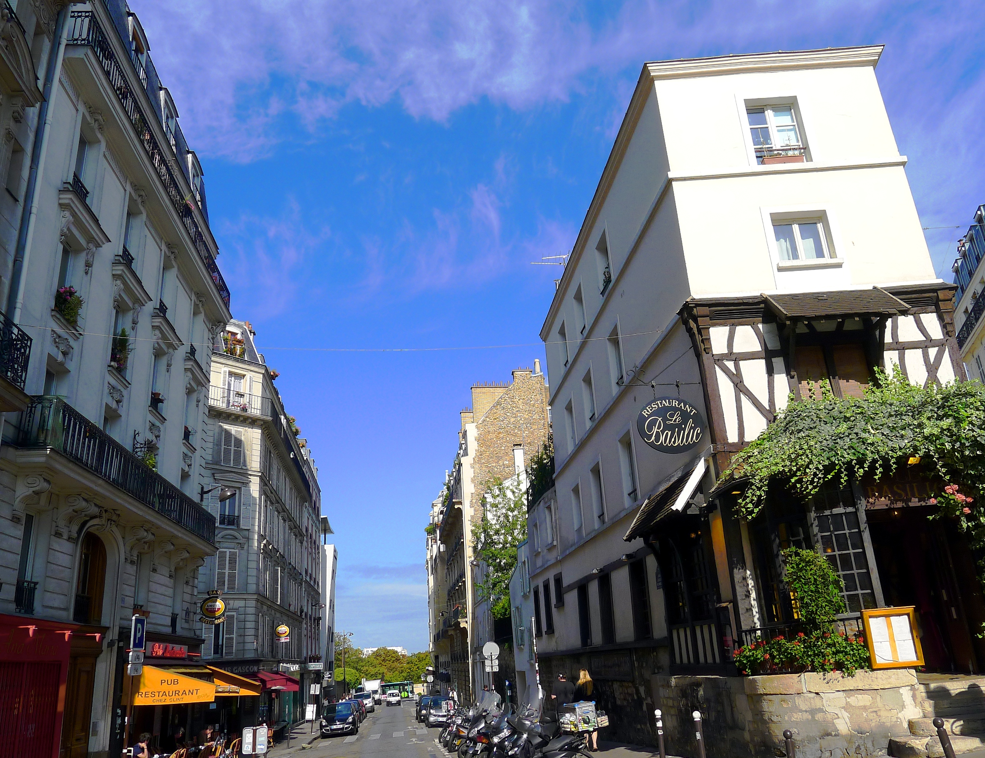 Rue Joseph-de-Maistre - Paris XVIII